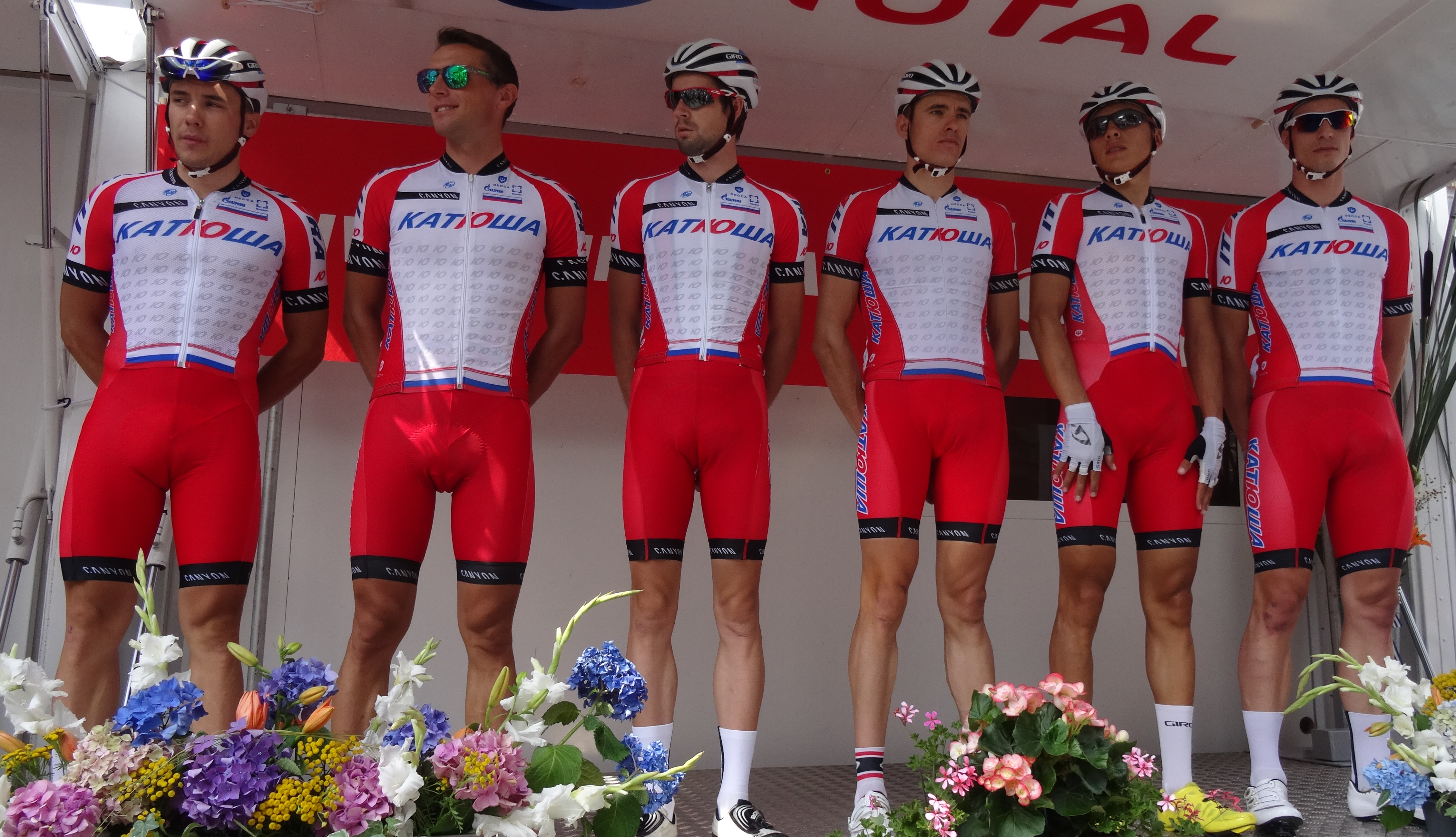 Reportage photographique réalisé le samedi 26 juillet à l'occasion du départ de la première étape du Tour de Wallonie 2014 à Frasnes-lez-Anvaing, Belgique.